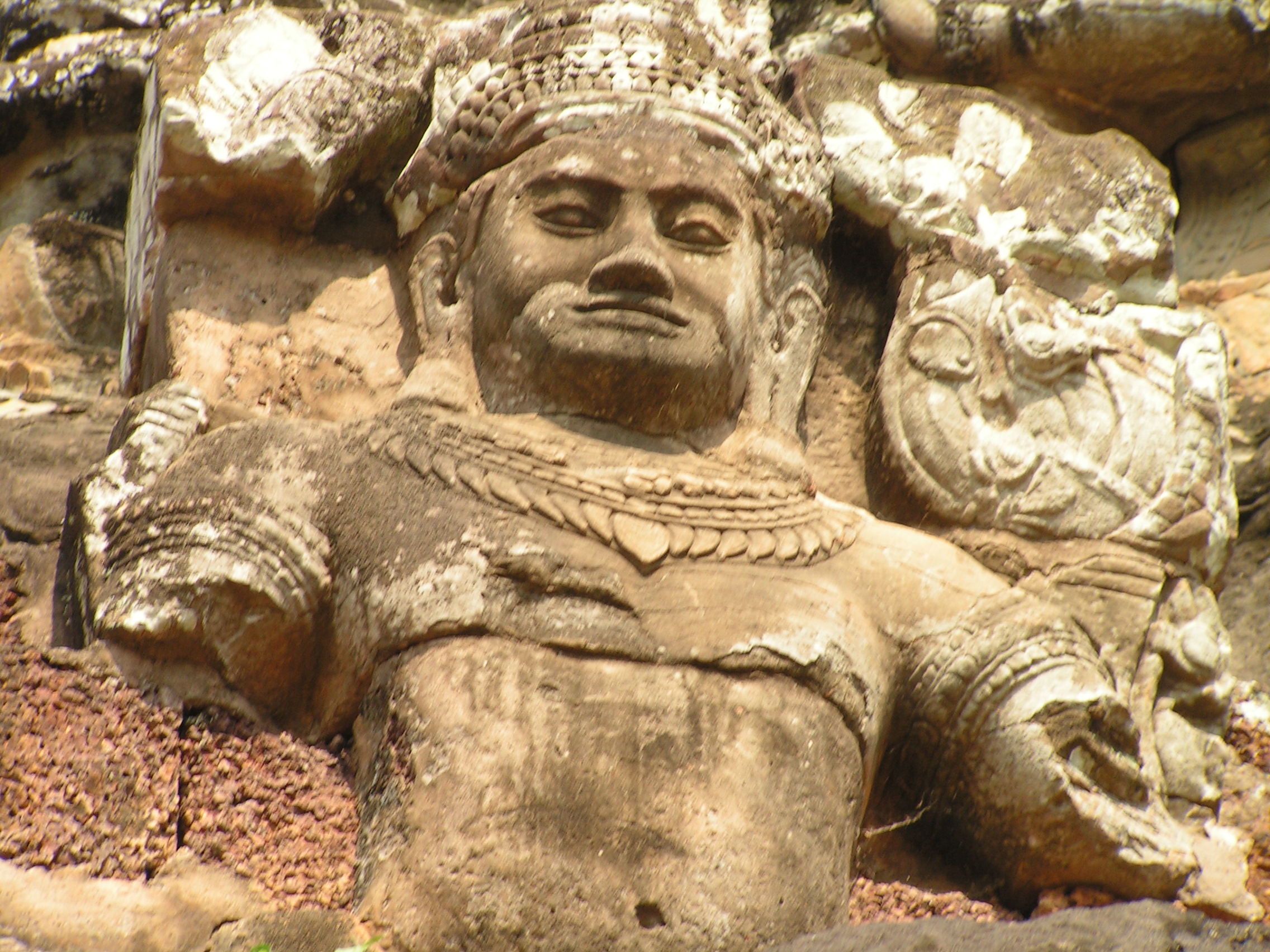 Soldier at Angkor